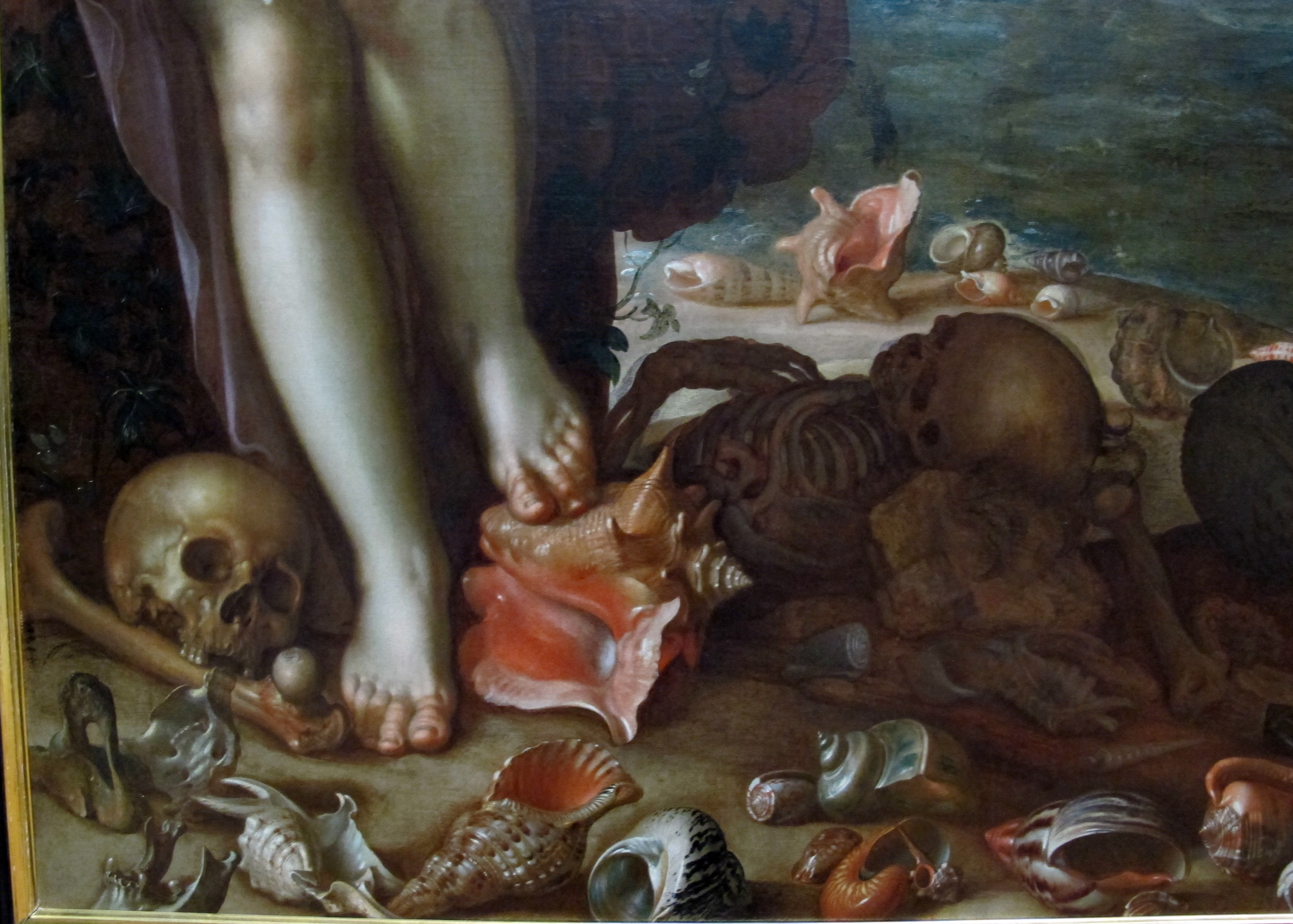 Pittura fiamminga al Louvre, Parigi